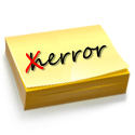 Error en español no es con hache…